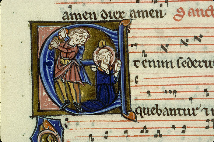 Lettre historiée - Lapidation